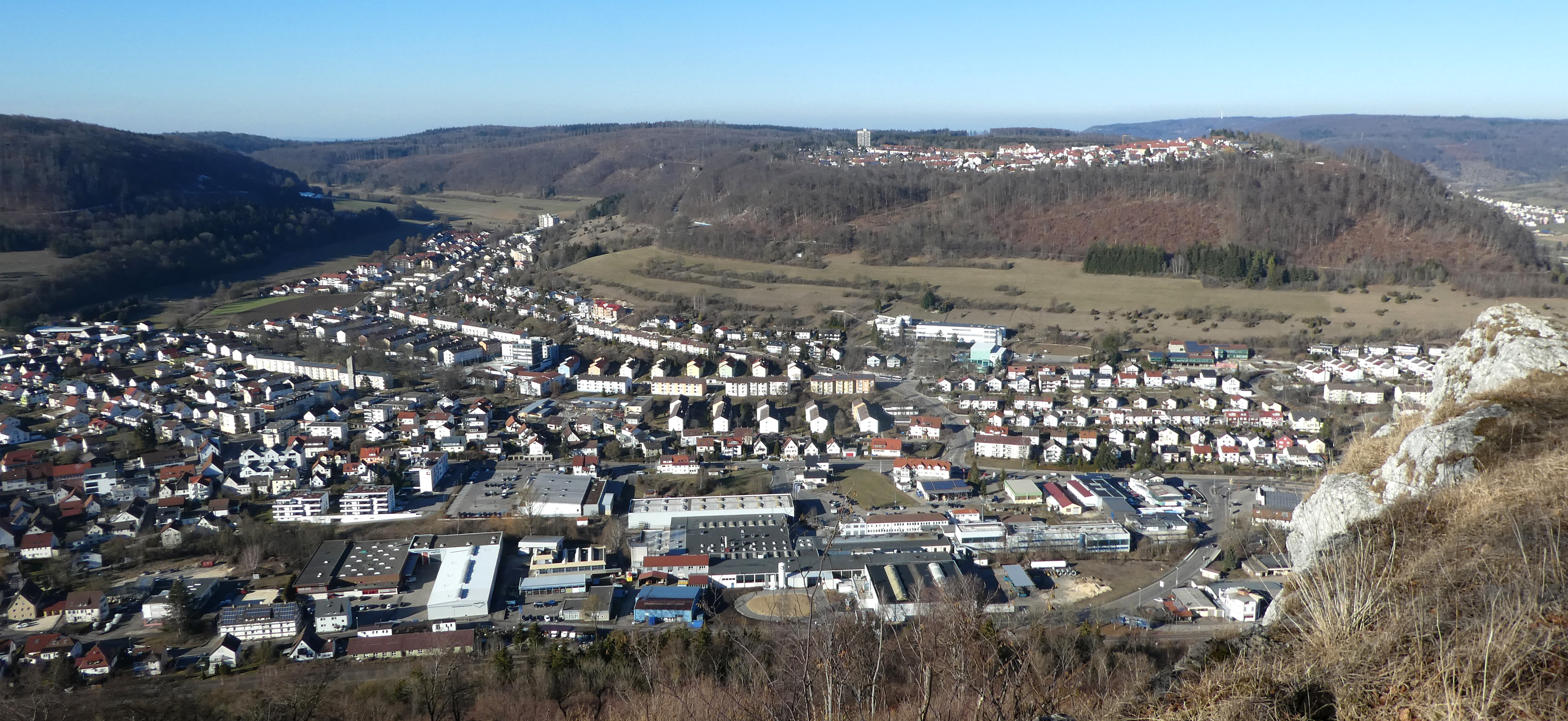 Oberkochen mit dem oberhalb gelegenen Stadtteil Heide vom Rodstein aus